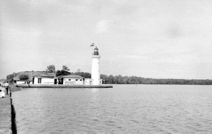 Repronegatief. Vuurtoren Oude Havenkanaal